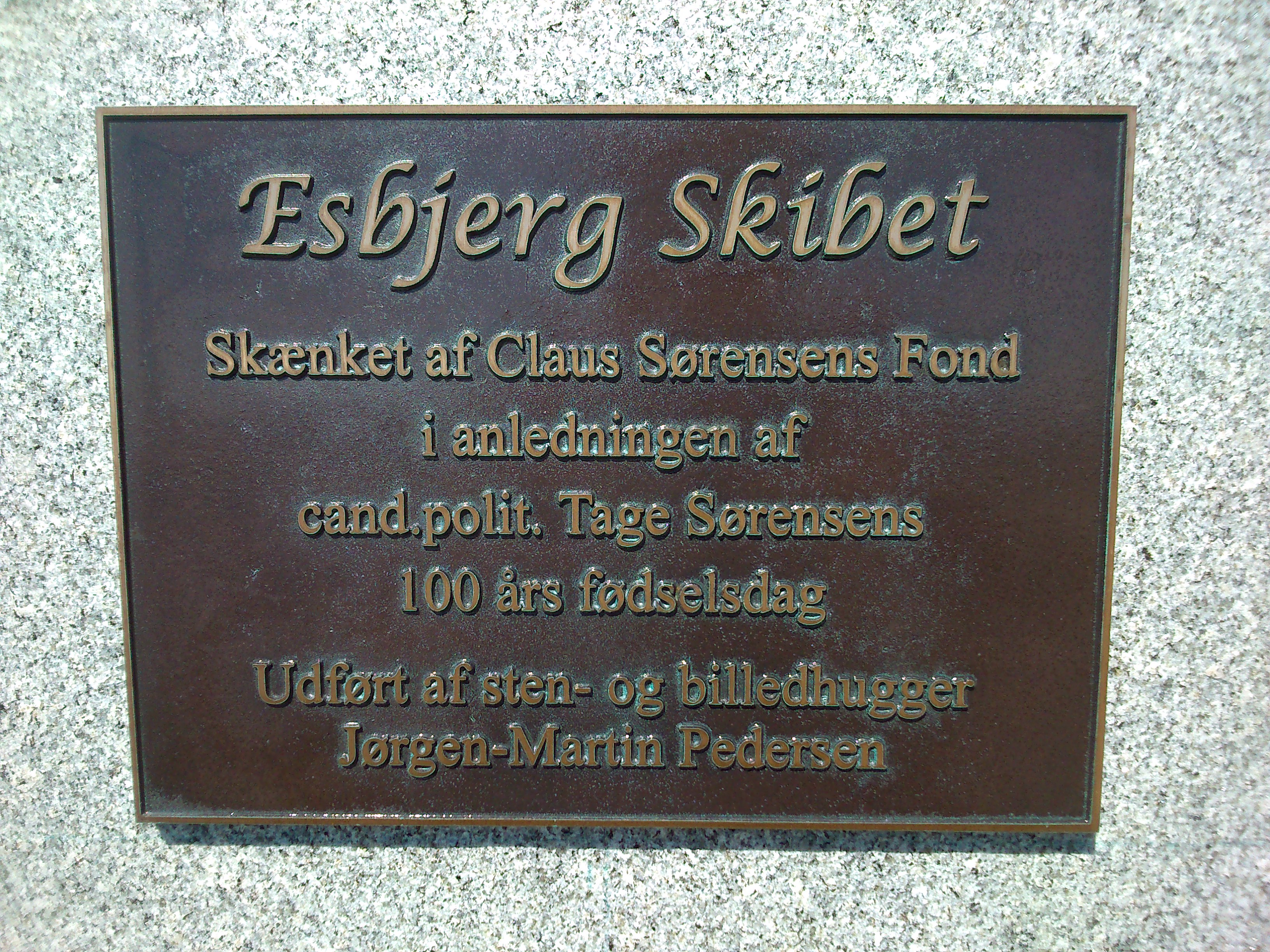 mindeplade for Skibet Esbjerg